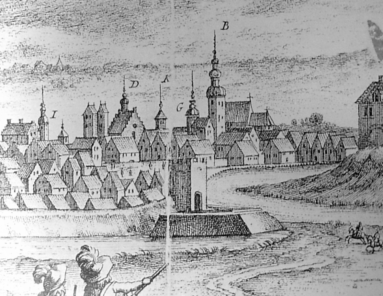 Fragment sztychu Erika Dahlberga z lipca 1657 r. przedstawiający miasto Bydgoszcz wraz ze zniszczonym zamkiem